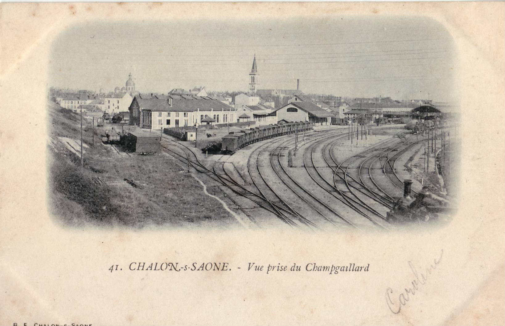 Carte postale ancienne éditée par B. F. à Chalon-s-Saône : CHALON-SUR-SAÔNE - Vue prise de Champgaillard